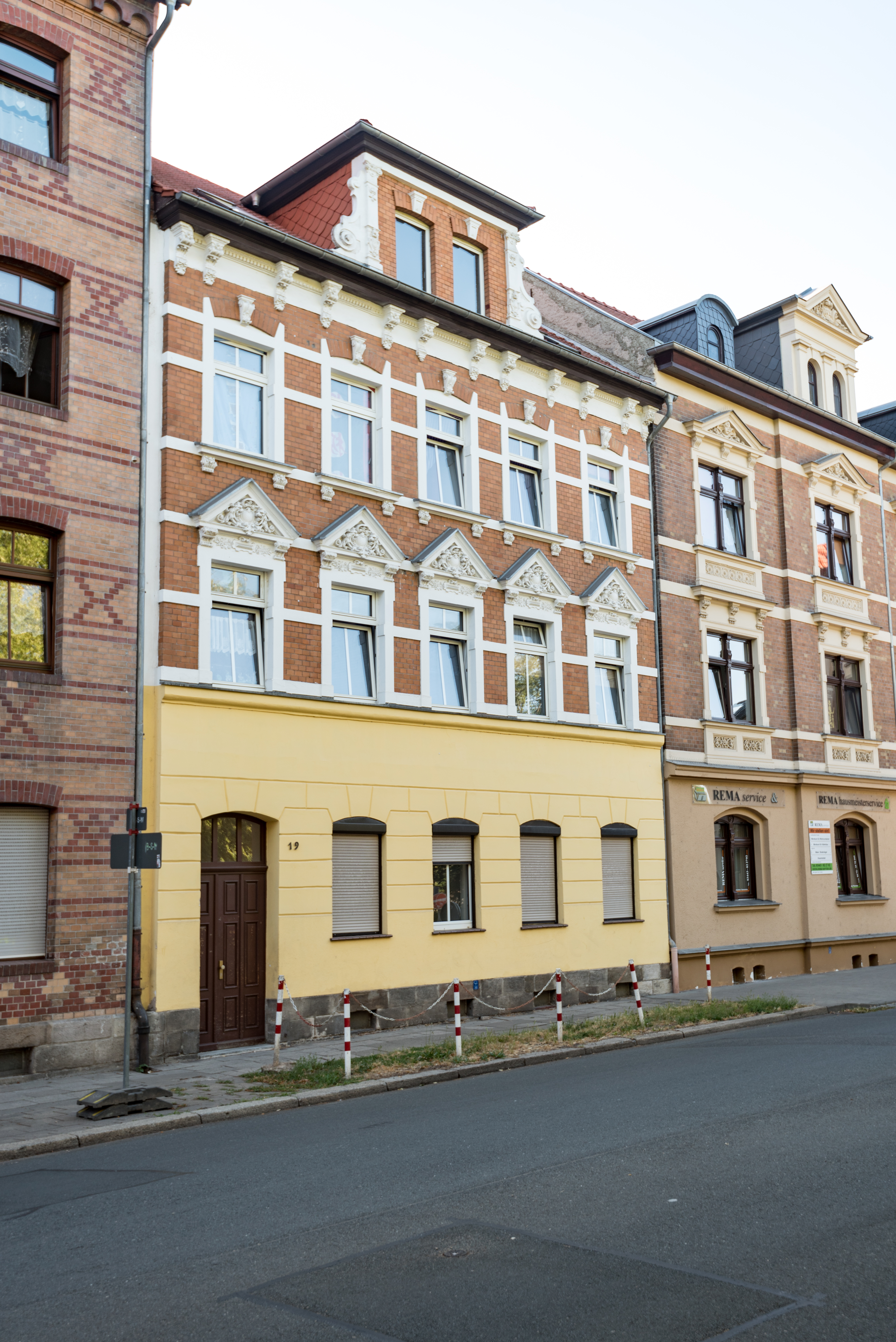 Weißenfels, Große Deichstraße 19